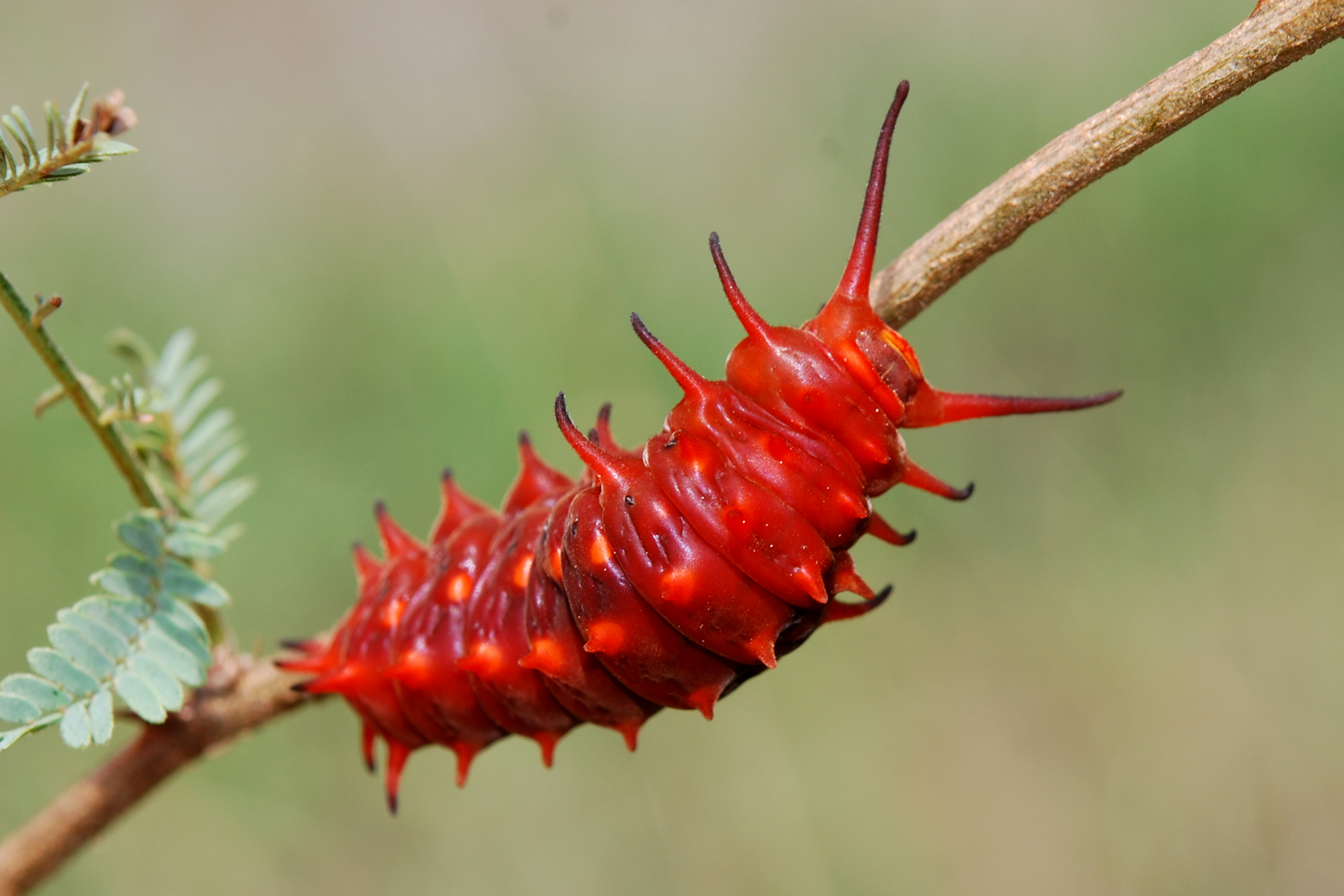 Papilionidae: Battus philenor Peña Blanca Valley, Santa Cruz Co., Arizona